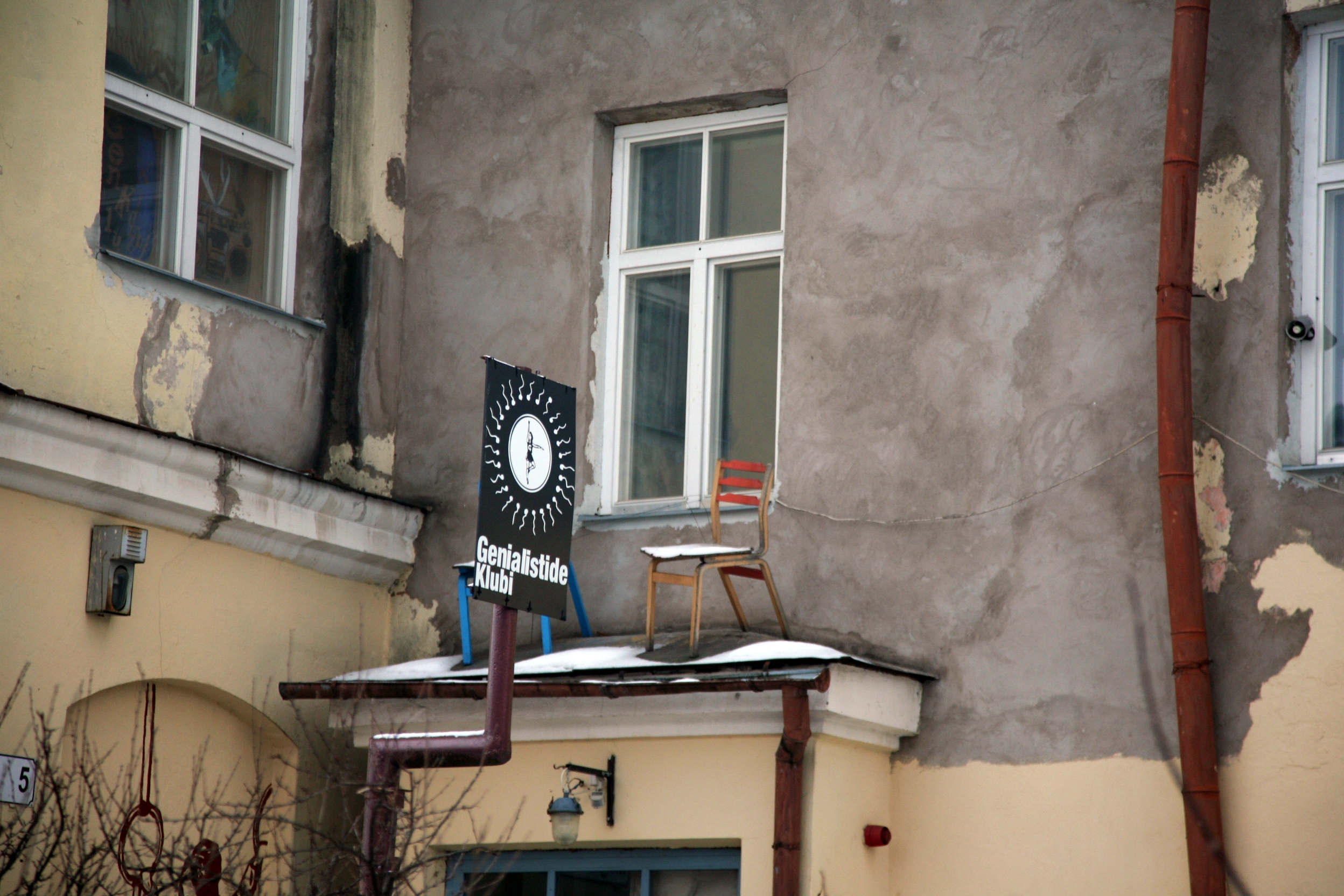 Genialistide Klubi hoone sissekäik Tartus Magasini tänaval, 3. veebruar 2013.